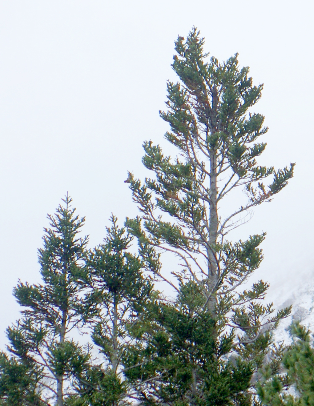 Abies vejarii, Los Oyameles, Arteaga, Coahuila